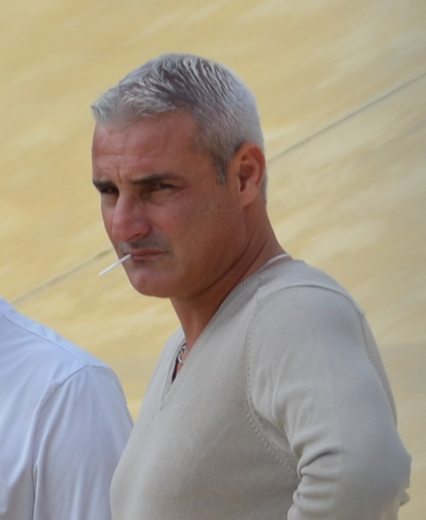 Alain Caveglia, directeur sportif du Stade Malherbe de Caen, photographié lors d'un match amical de la réserve caennaise face au Stade rennais.